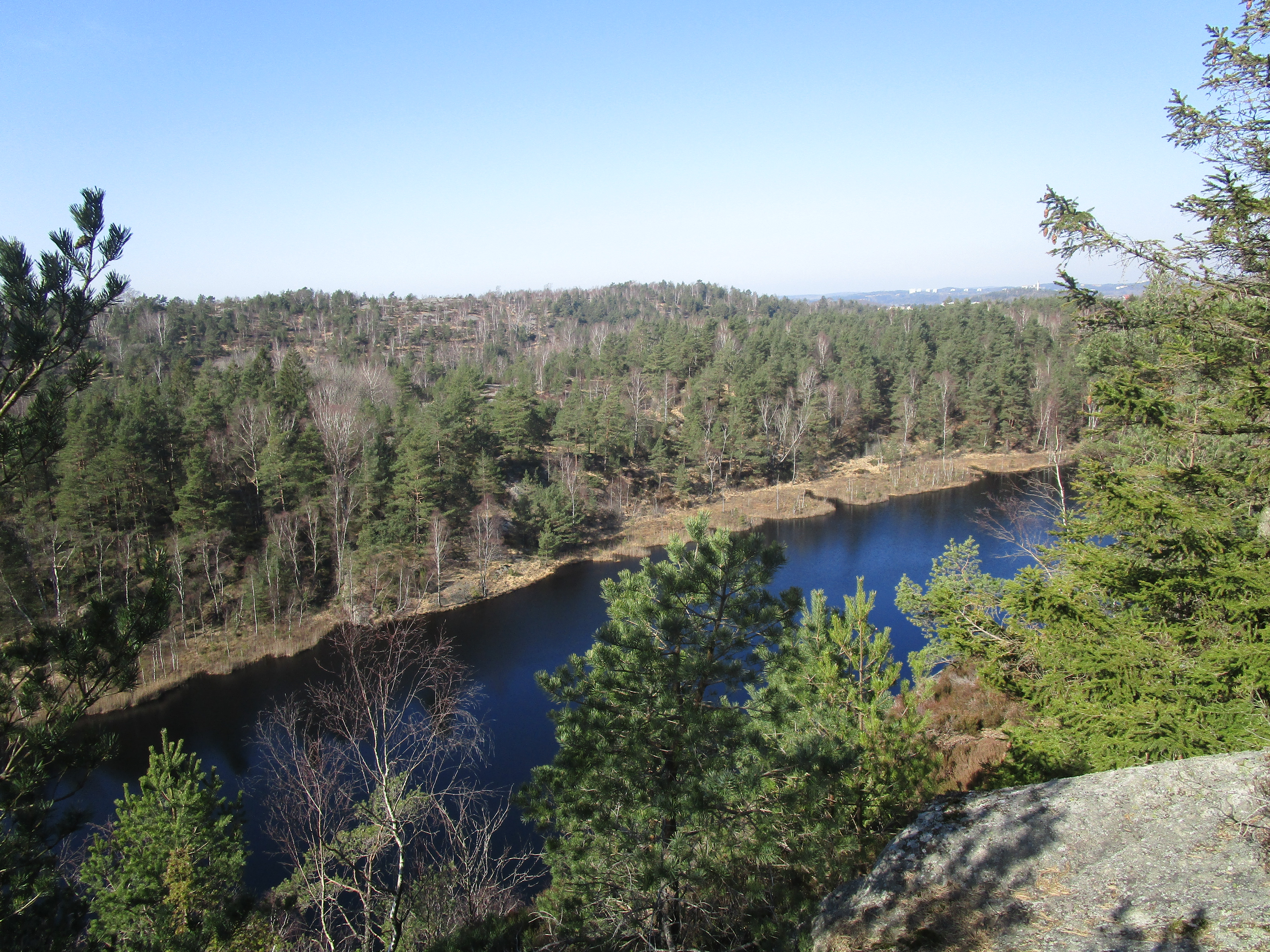 Blacktjärn från den branta östra sidan 27 mars 2020.